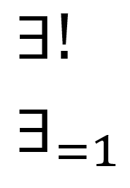 Uniqueness Quantification